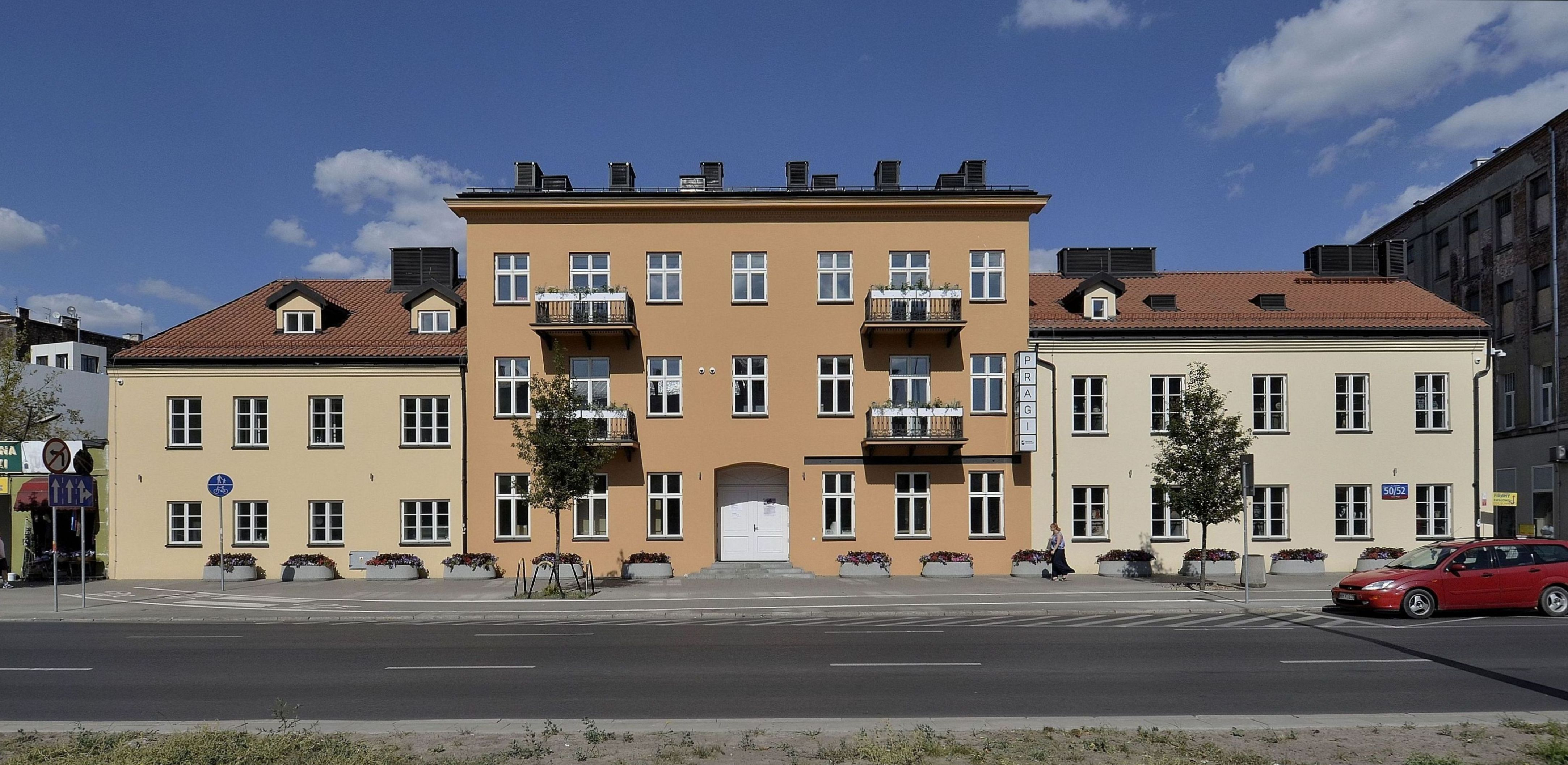 Muzeum Warszawskiej Pragi w Warszawie